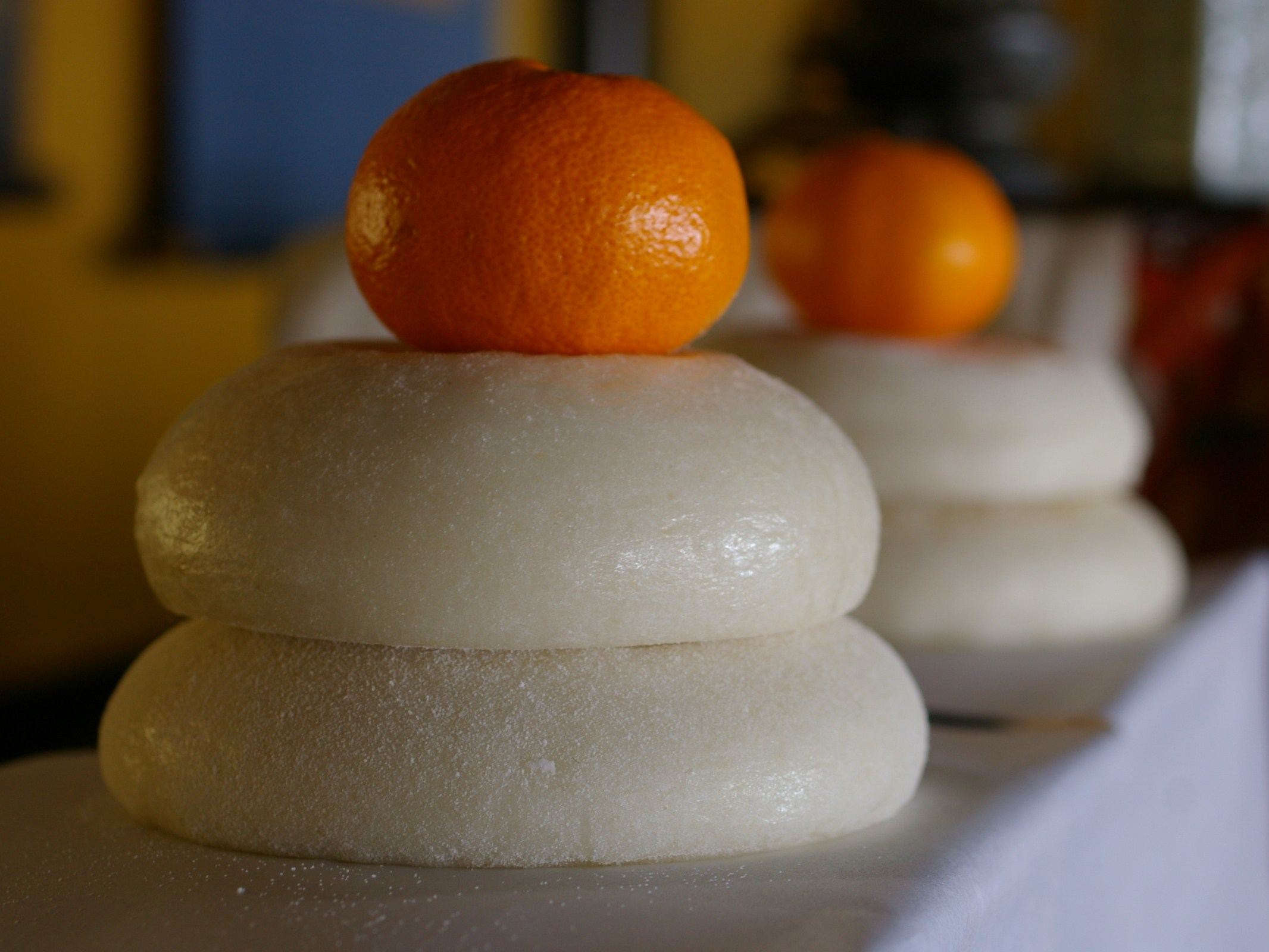 みかんを載せた鏡餅